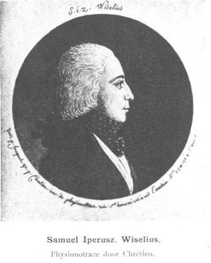 Physionotrace de Samuel Iperusz. Wiselius, dessiné par J. Fouquet? et gravé par G.L. Chrétien